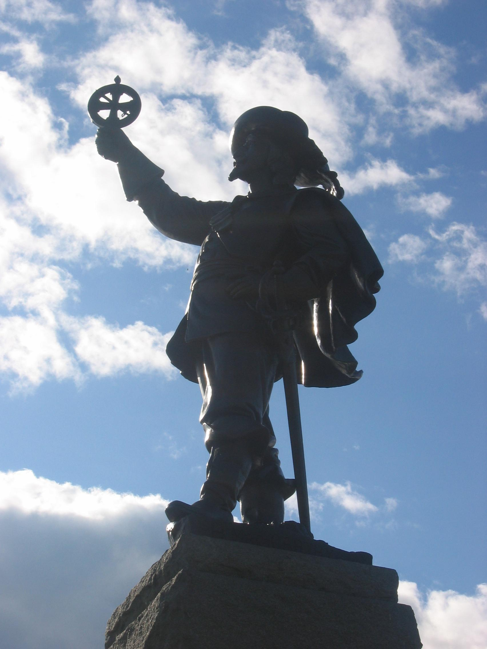 Statue de Samuel de Champlain à Ottawa.